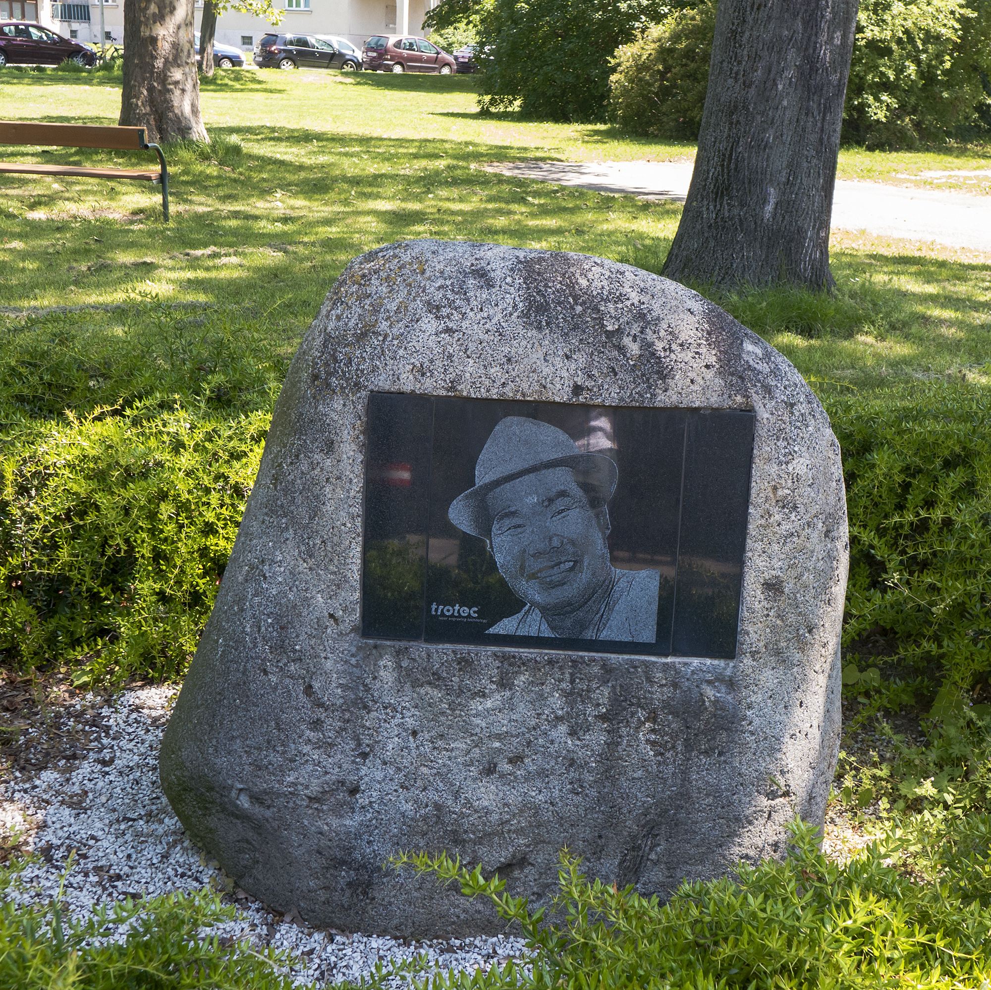 Tora-San-Park in Wien 21